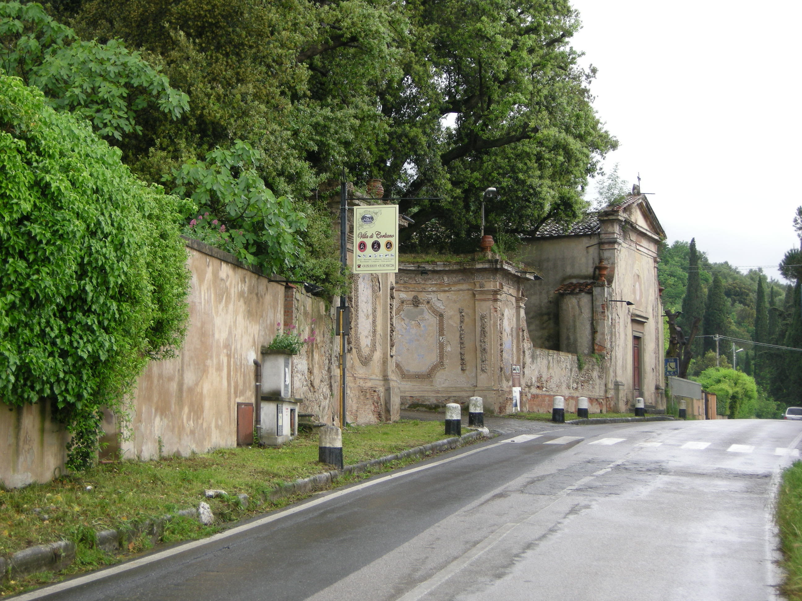 Villa di corliano